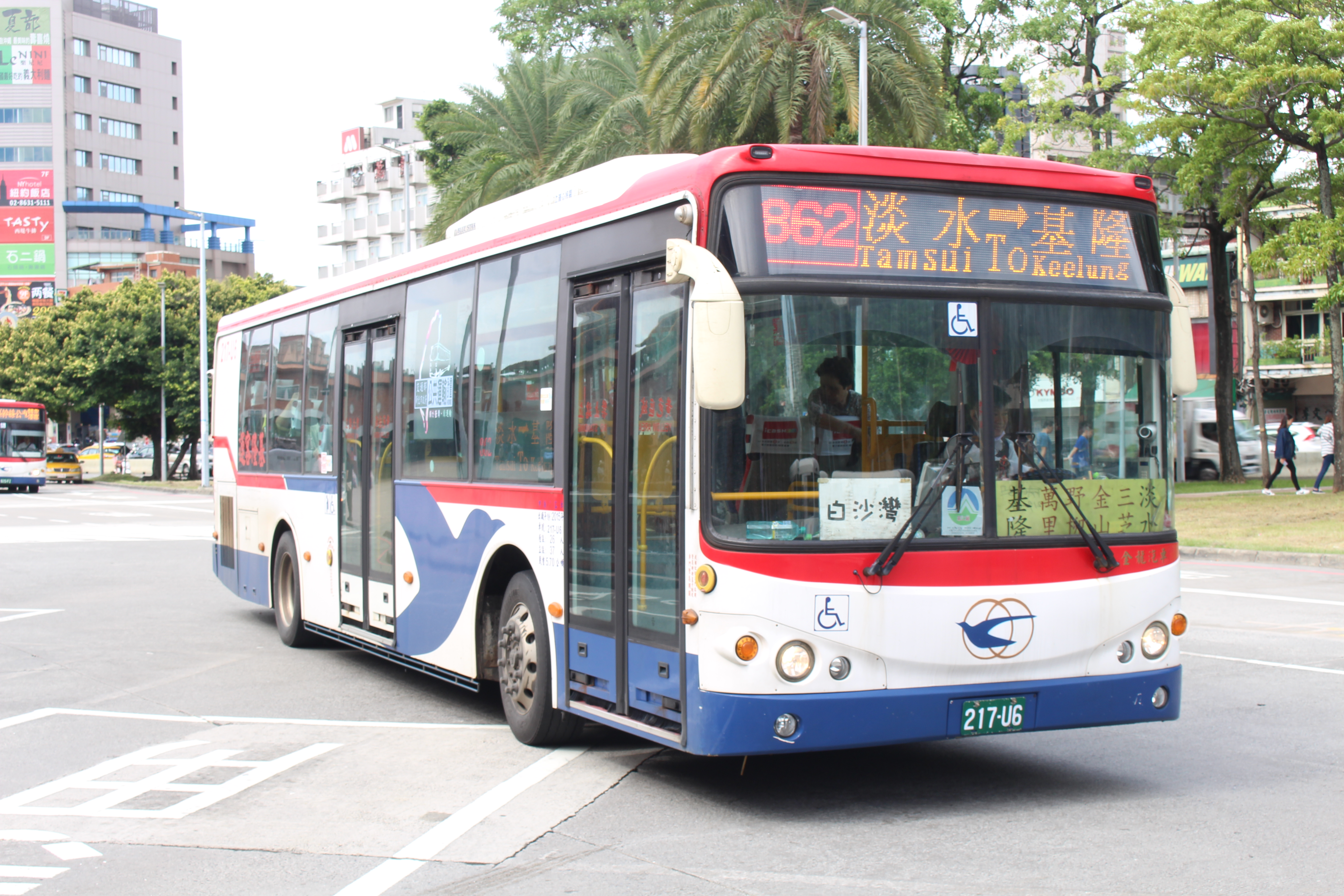 基隆客運217-U6 862